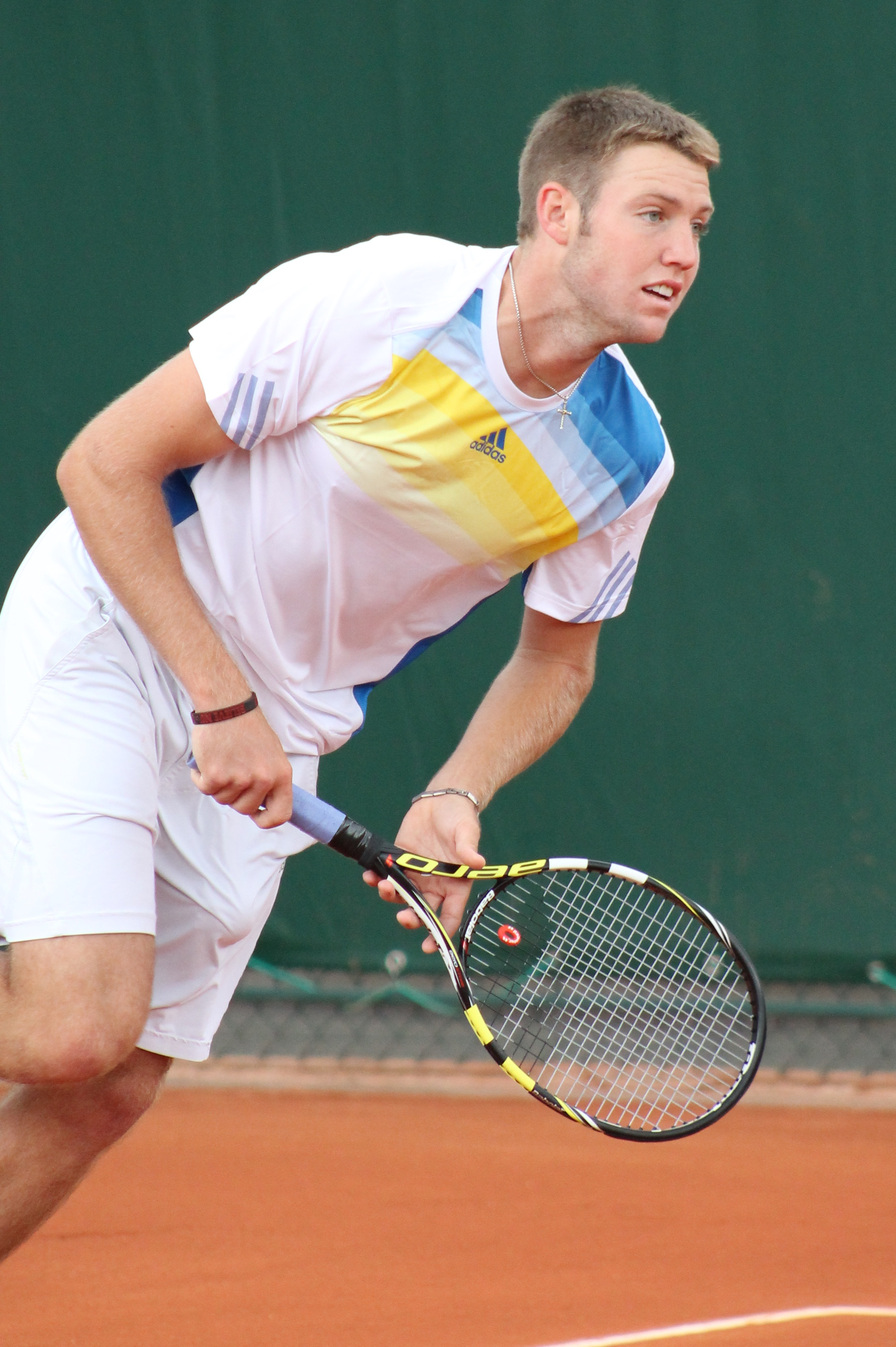 Sock RG13 (5)